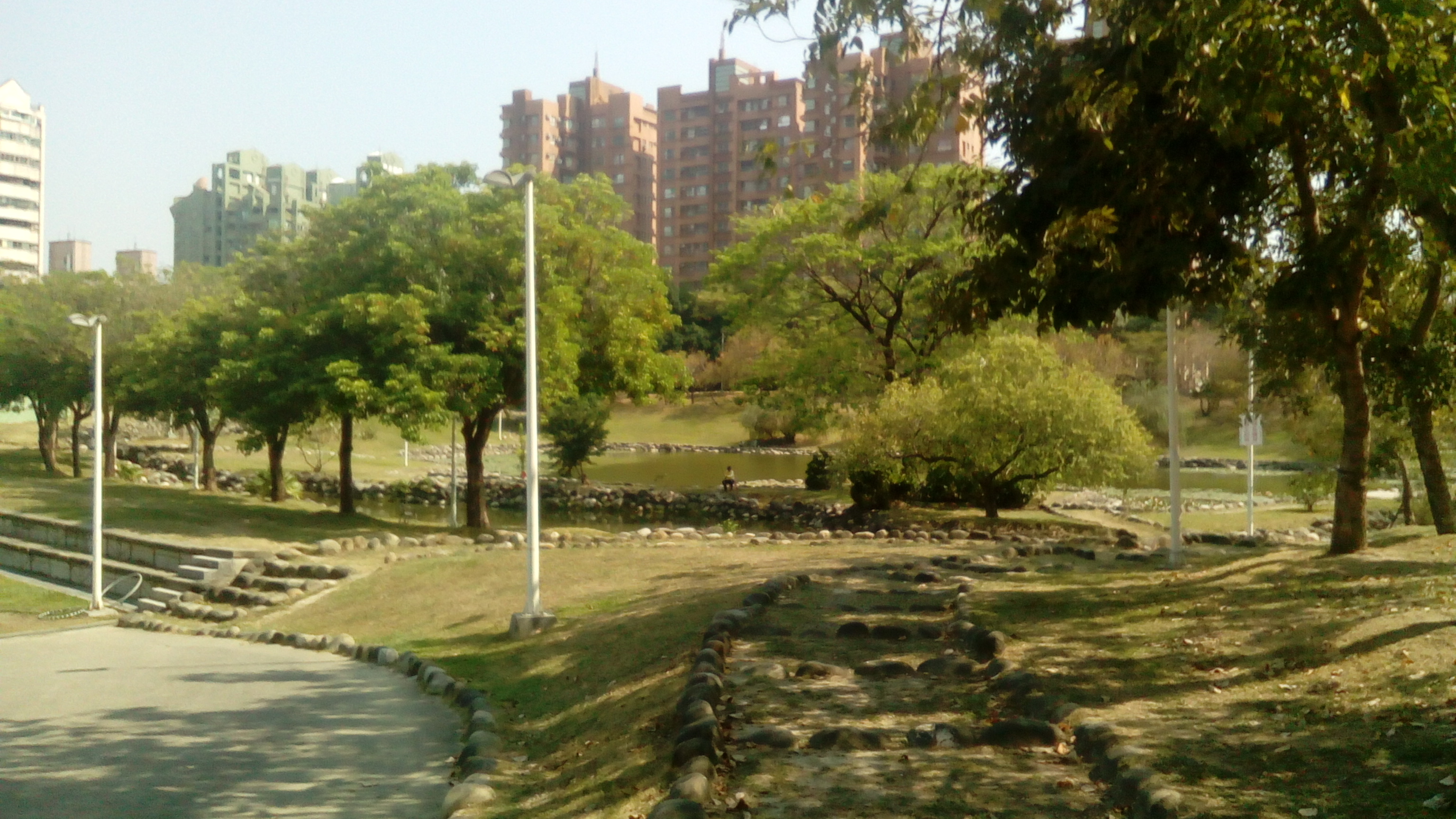 位於明誠路全聯對面